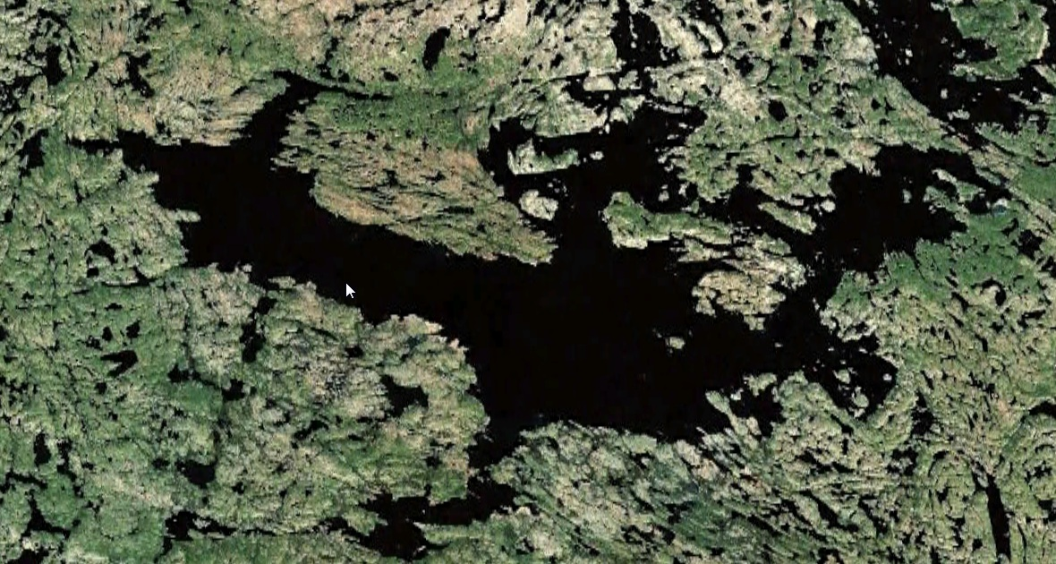 Lac de Gras (Territoires du Nord-Ouest)